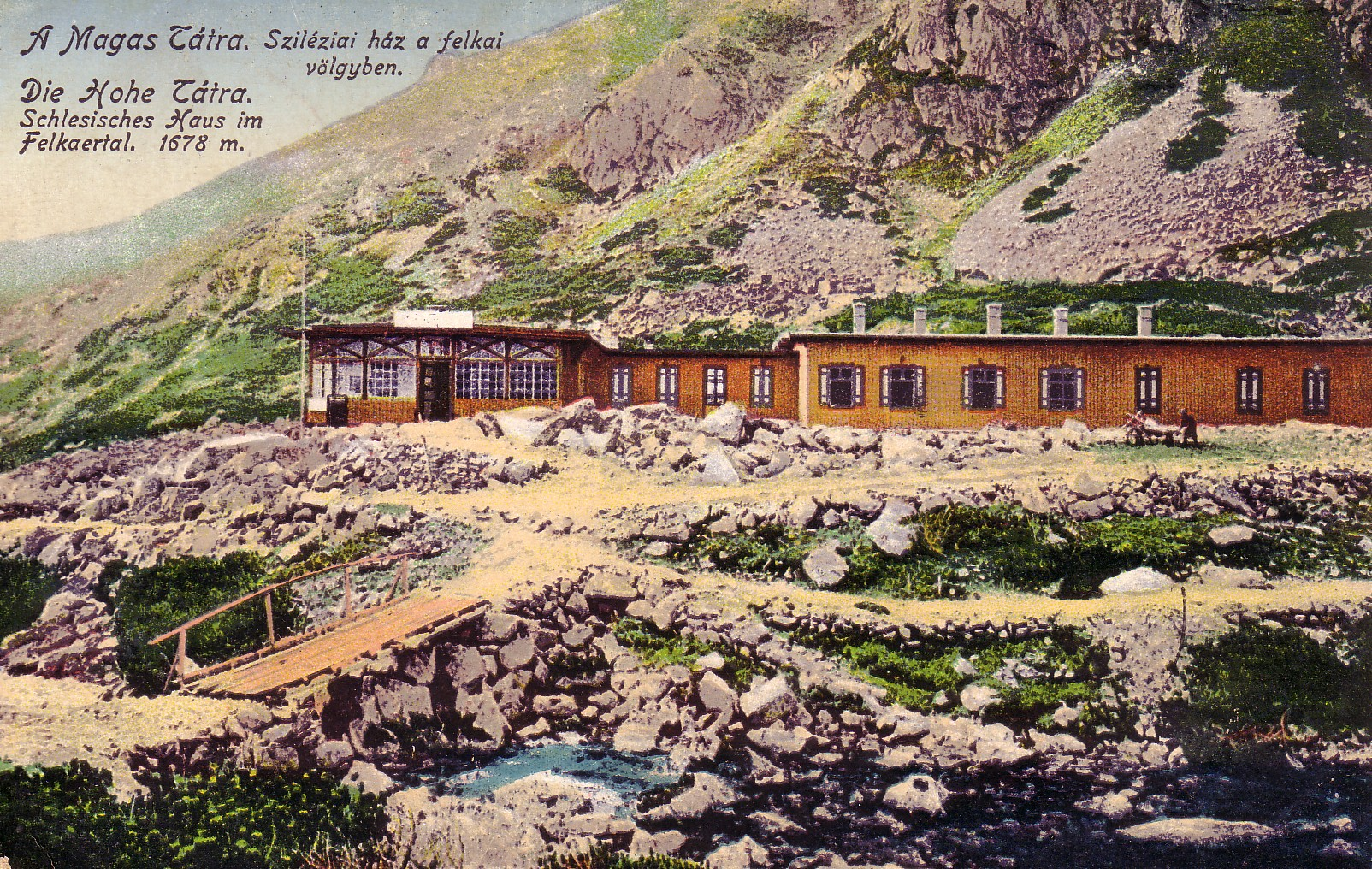 Hohe Tatra; Die Hütte wurde 1894 von der Schlesischen Sektion des Ungarischen Karpathenvereis errichtet.